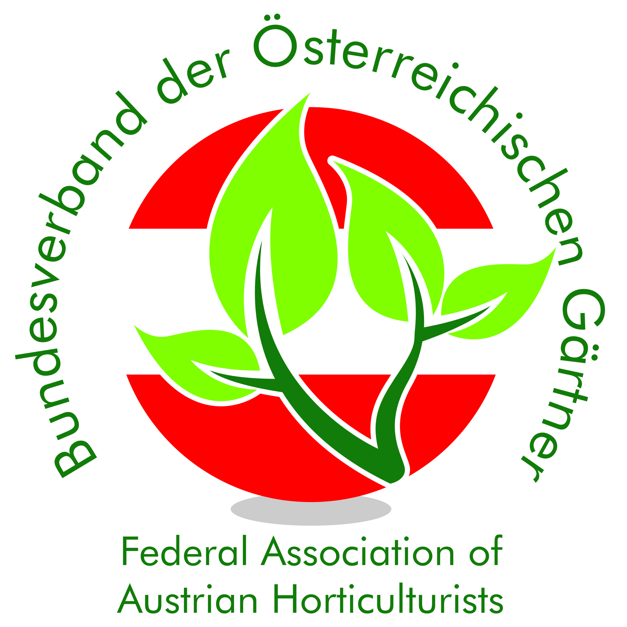 Logo des Bundesverbandes der Österreichischen Gärtner